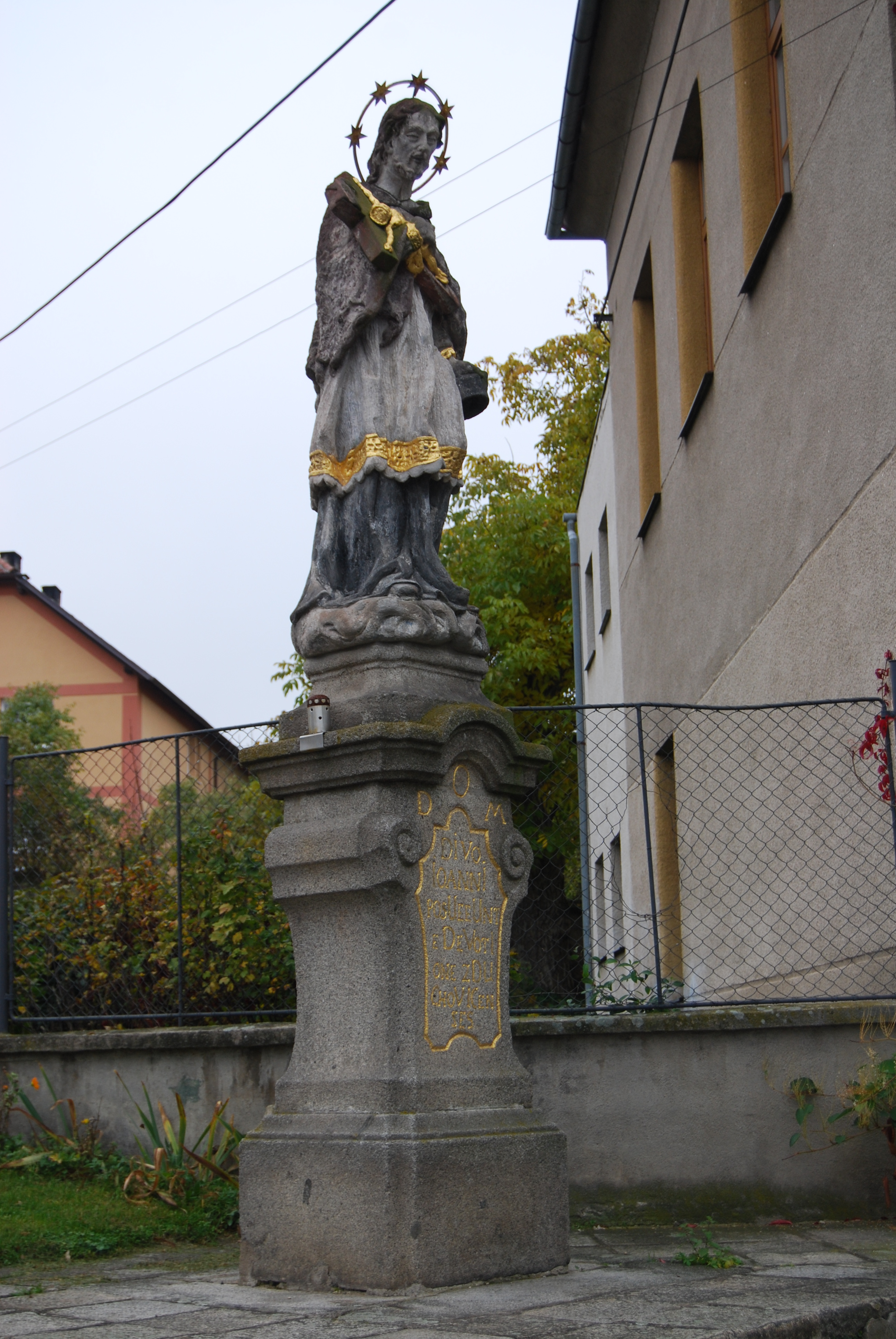 Socha sv. Jana Nepomuckého v obci. Obec Zduchovice v okrese Příbram, kraj Středočeský. Česká republika.